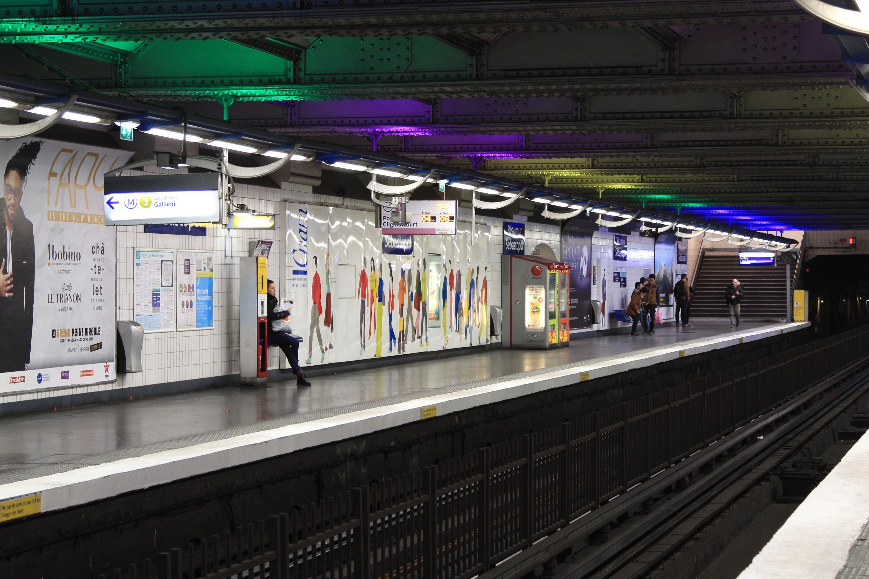 Vue du quai à destination de Porte de Cligancourt de la station du métro parisien Réaumur - Sébastopol (ligne 4).